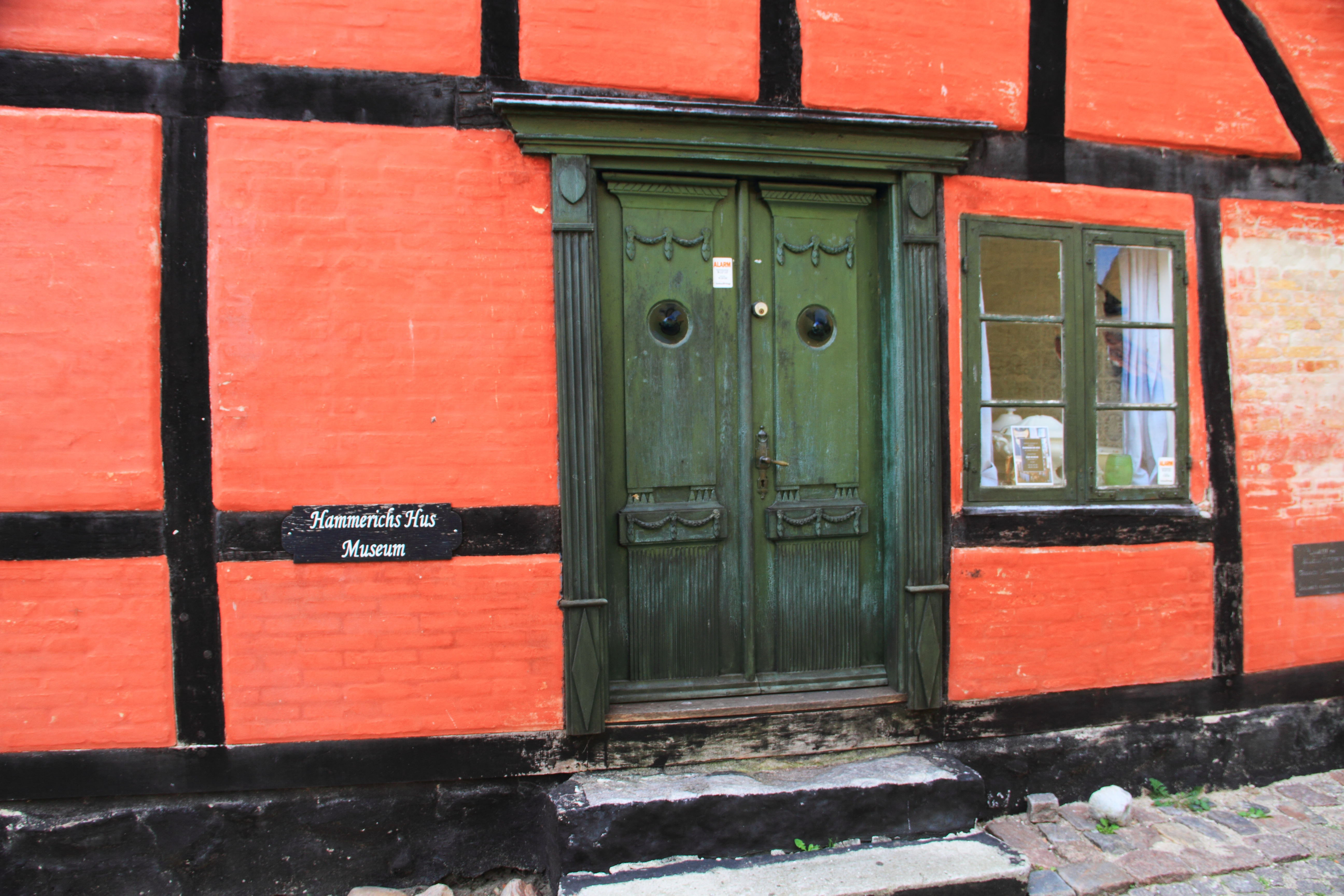 Das Museum zu Ehren von Gunar Hammerich in Ærøskøbing.